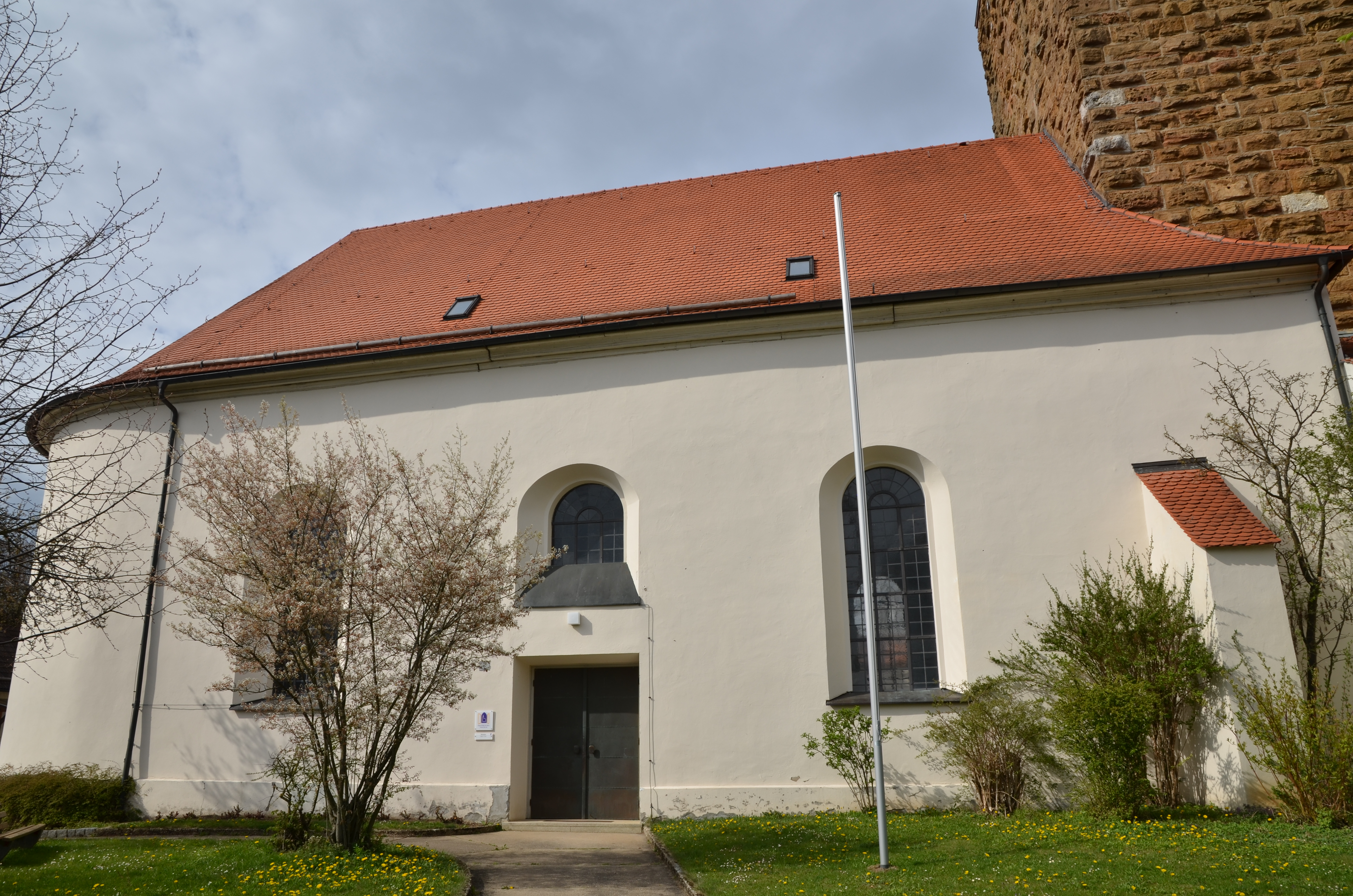 Evangelische Kirche